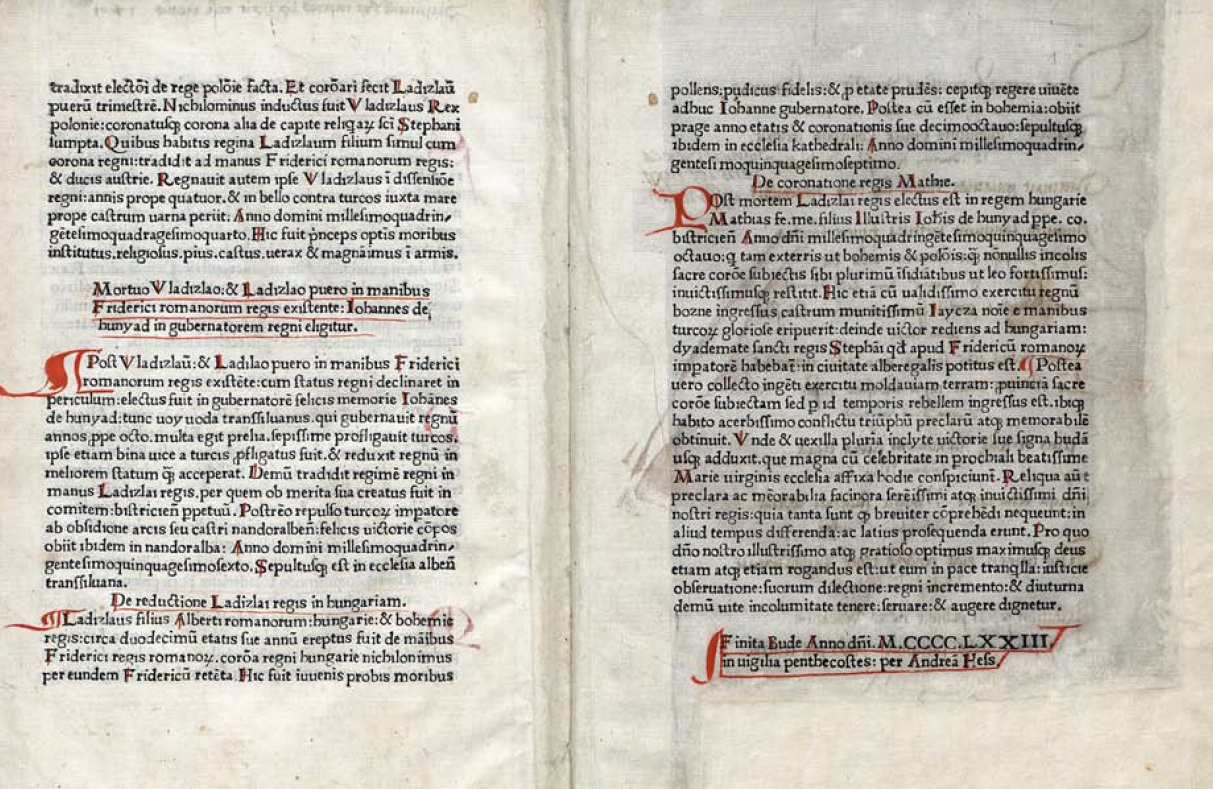 Hess András nevét latinos alakban használta, vagyis Andrea Hess a helyes megnevezése, amit a Chronica Hungarorum, a Budai Krónika ajánlása tartalmaz, továbbá ami a mű záró soraiban, a kolofónban található. "Finita Bude anno Domini MCCCCLXXIII in vigilia penthecostes: per Andrea Hess" , azaz "Befejeződött Budán az Úr 1473. esztendejében pünkösd előestéjén Hess András által". A Budai Krónikának ezzel az utolsó mondatával kezdődik a hazai nyomdászat története.